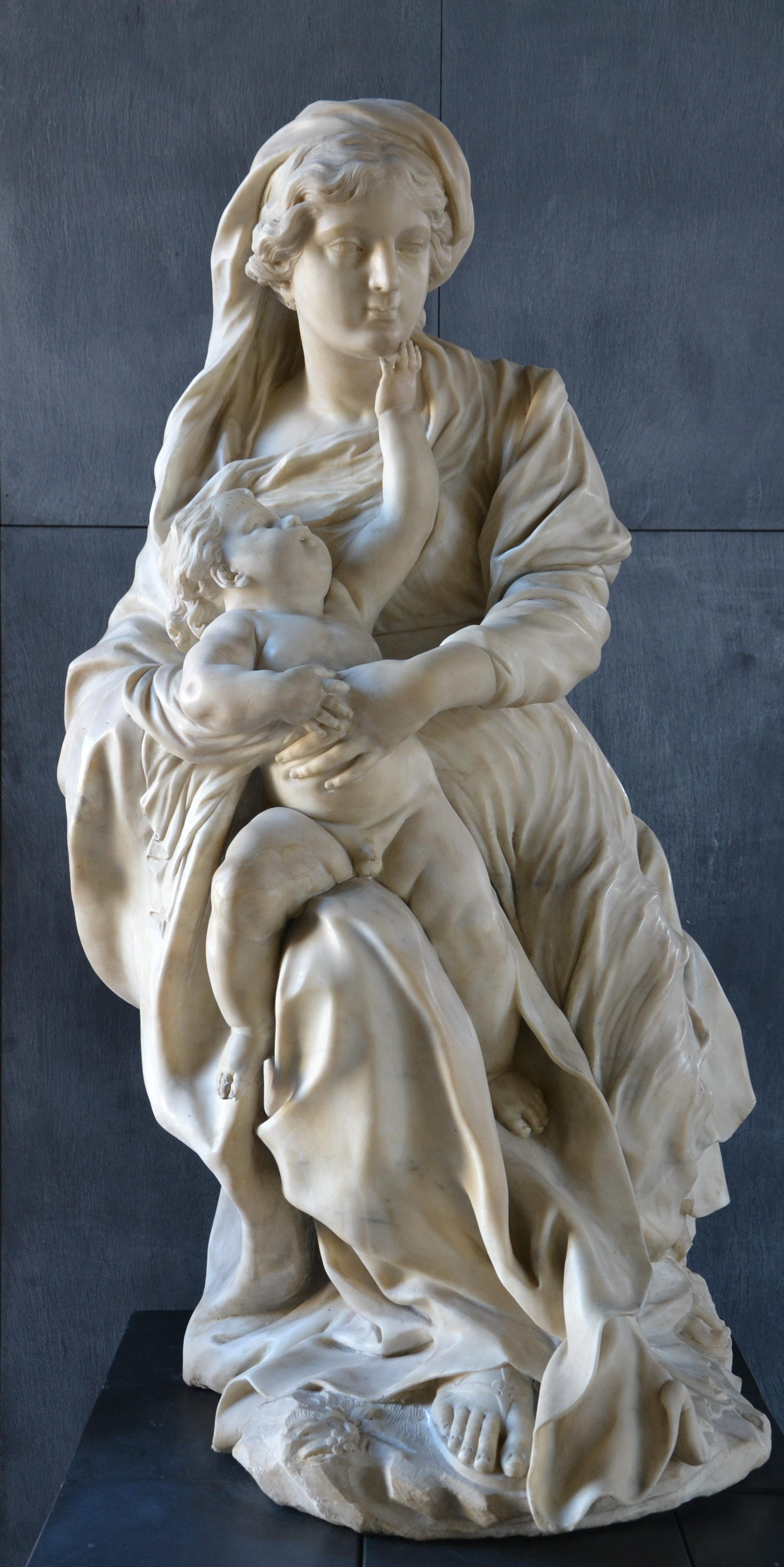 Museo di Sant'Agostino (Genova) Pierre Puget Madonna col bambino (Madonna Carrega) (1681)